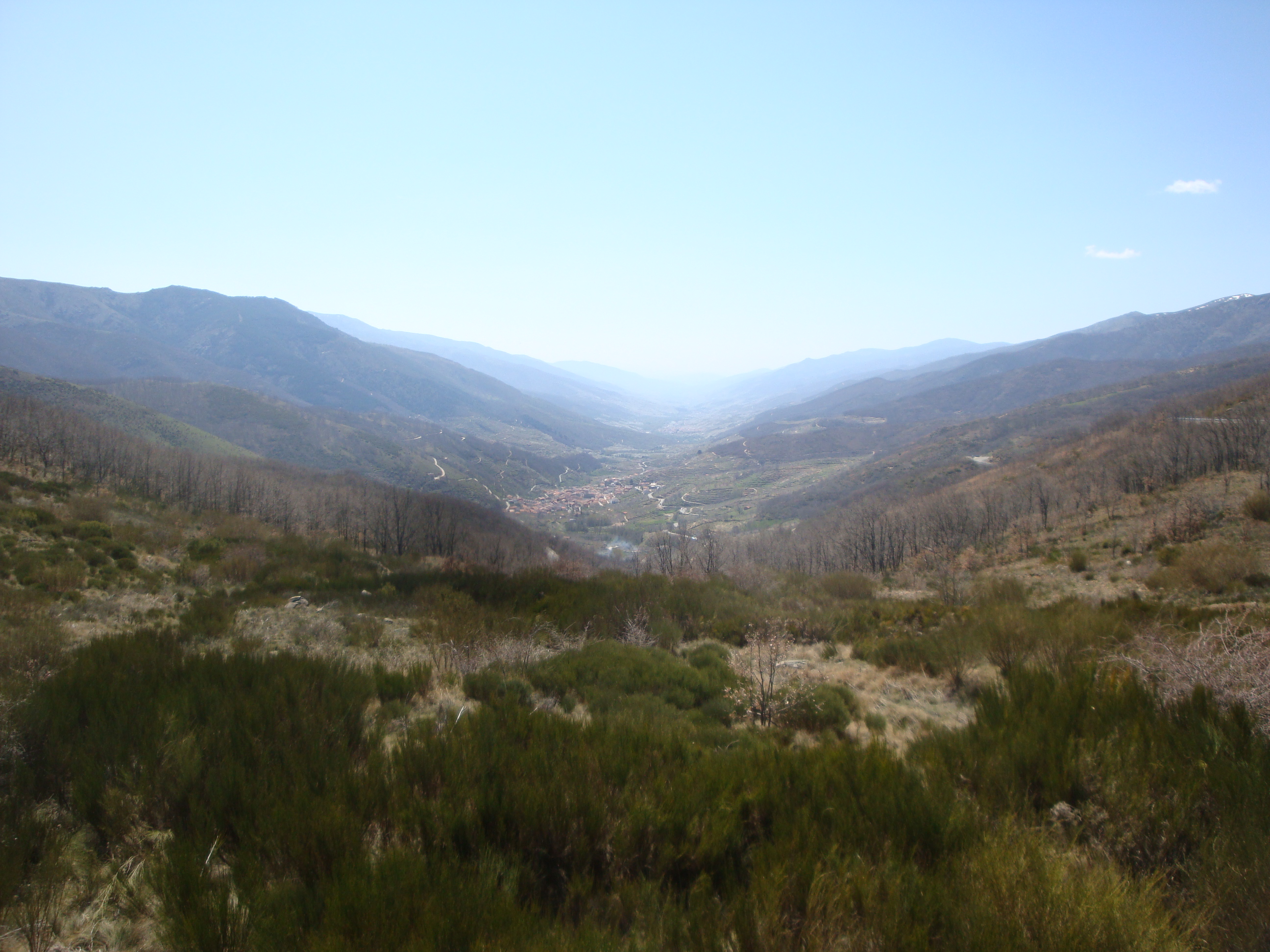 Vista general del Valle del Jerte (Cáceres)